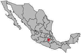 Locator map of Chalco de Díaz Covarrubias, México, Mexico